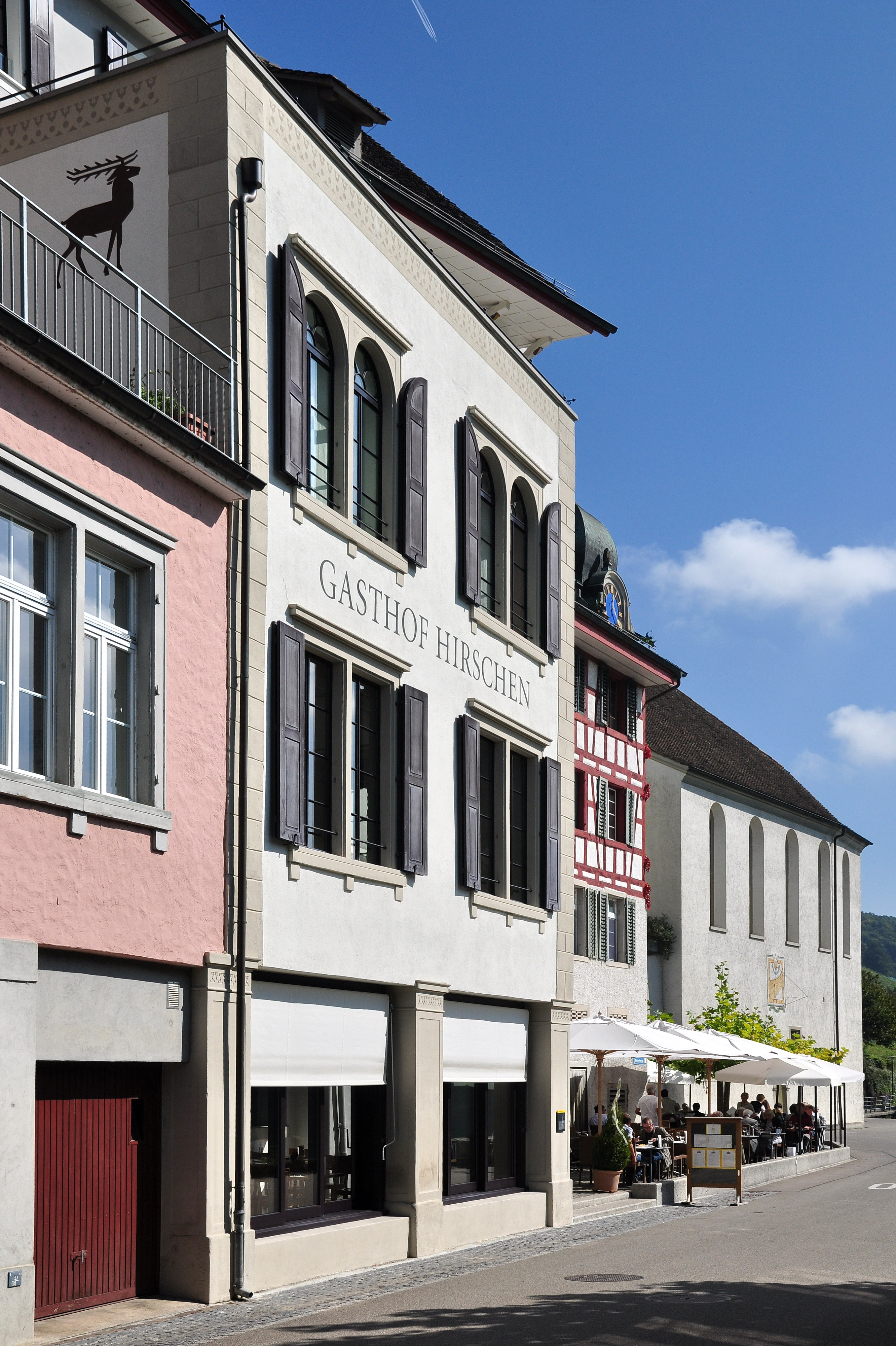 Gasthof Hirschen, Untergass 28 & Reformierte Kirche, Chilengass, in Eglisau (Switzerland)